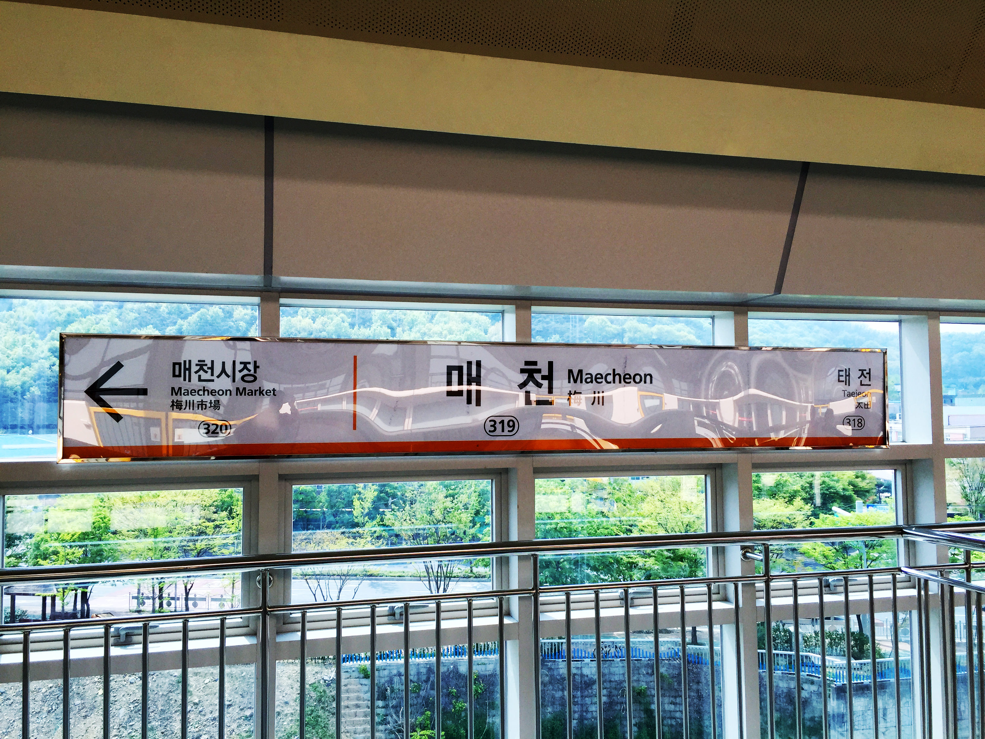 매천역 역명판